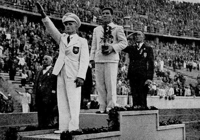 Zombori Ödön Berlin (1936) olimpiai bajnoka az eredményhirdetésen, kezében az ajándék tölgyfacsemetével